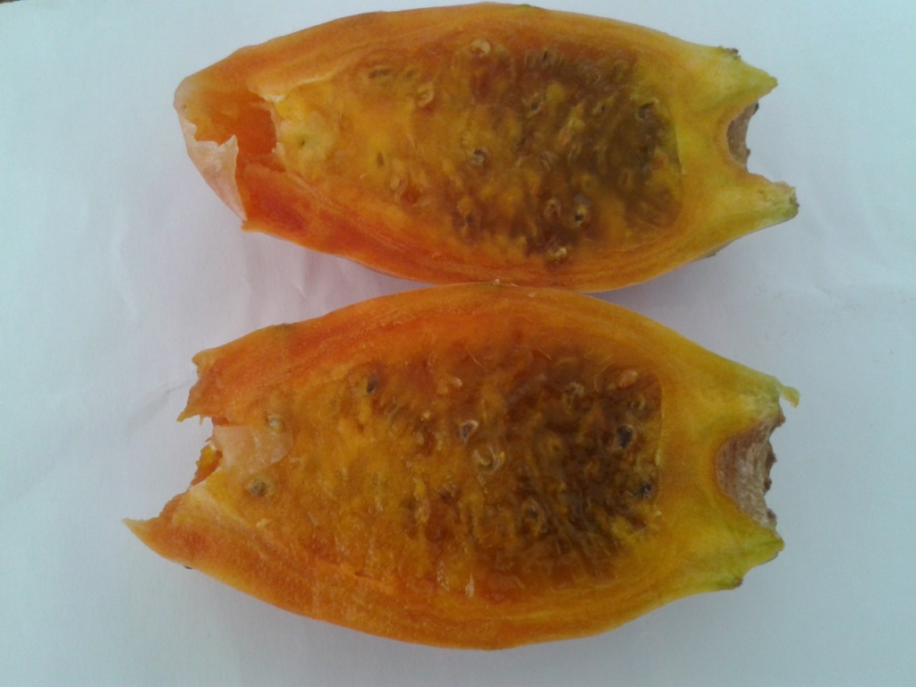 ميوه رسيده كاكتوس تنگ طه